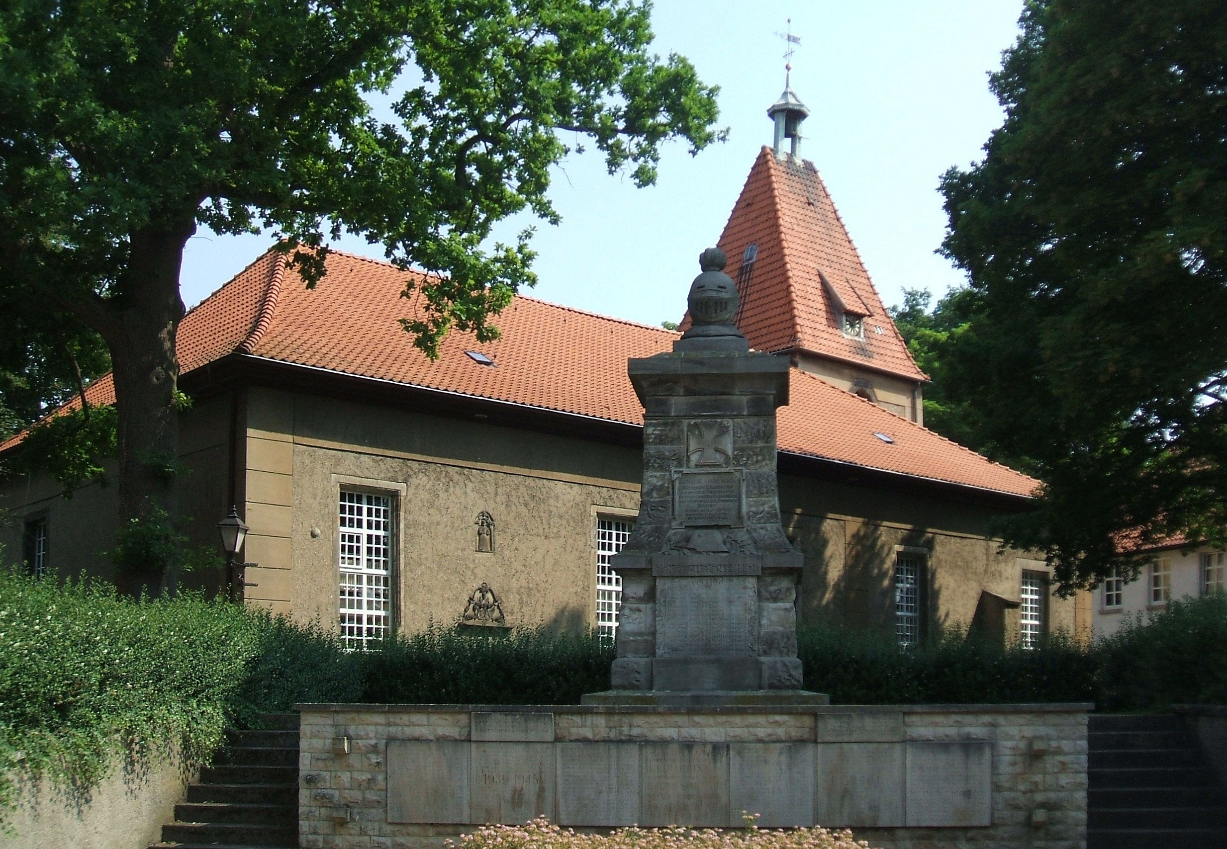 Springe, Ortsteil Gestorf, die Kirche im Vordergrund das Kriegerdenkmal